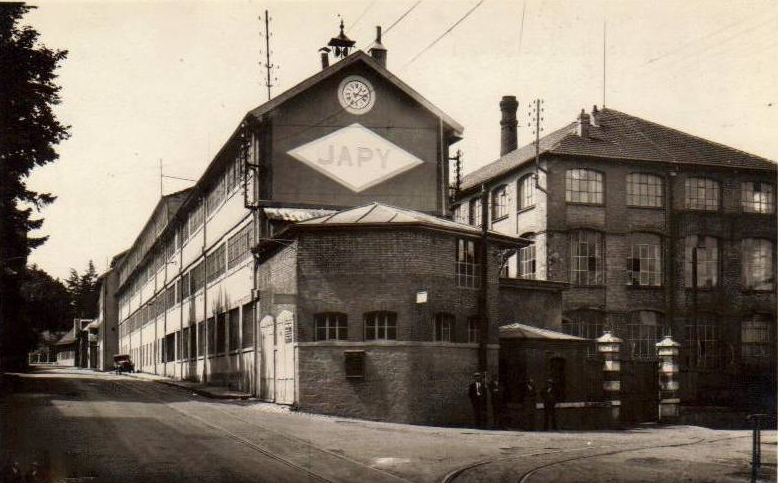 Usine des Fonteneilles au temps des Japy